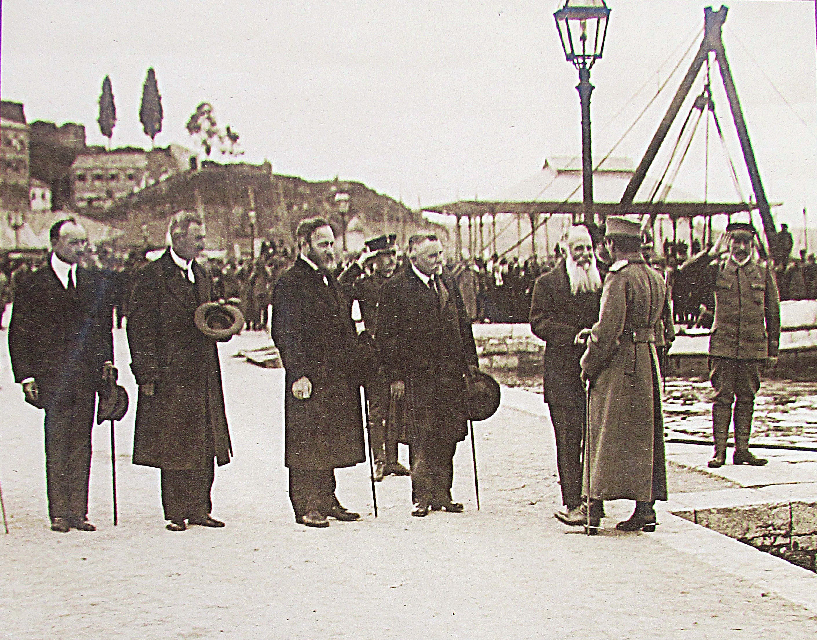 Iskrcavanje regenta Aleksandra na Krf, 1916